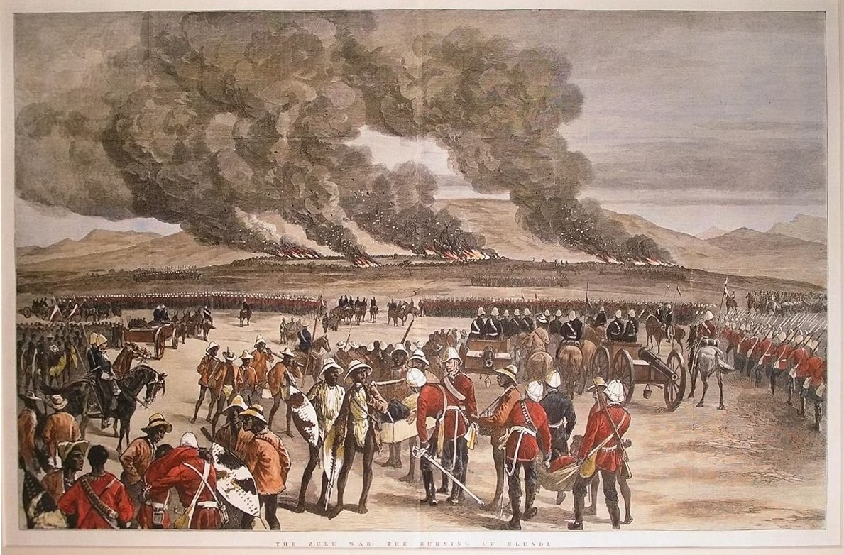 L'incendie d'Ulundi. Gravure de 1879